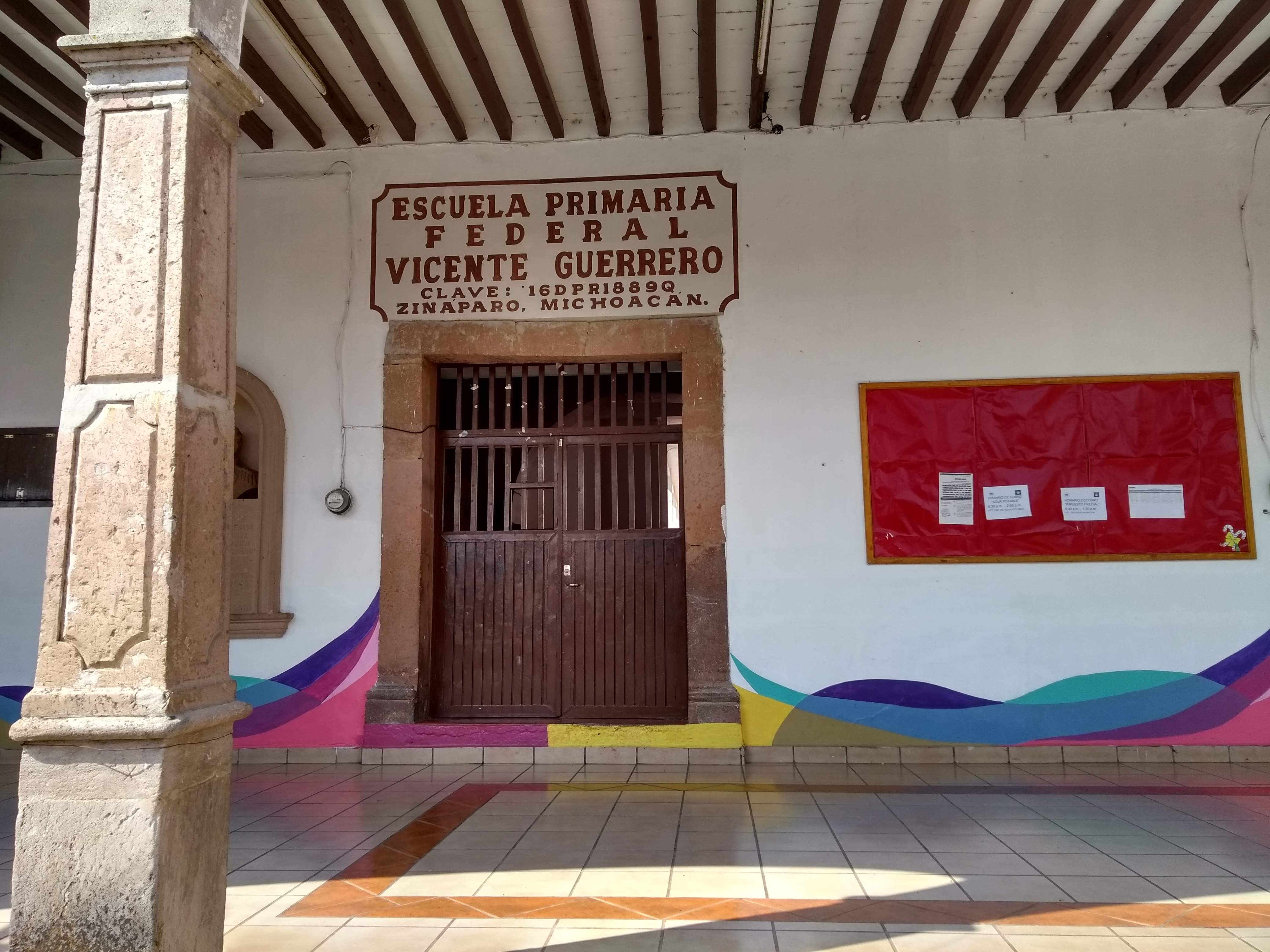 Esta es una escuela pública de Zinaparo, Michoacan